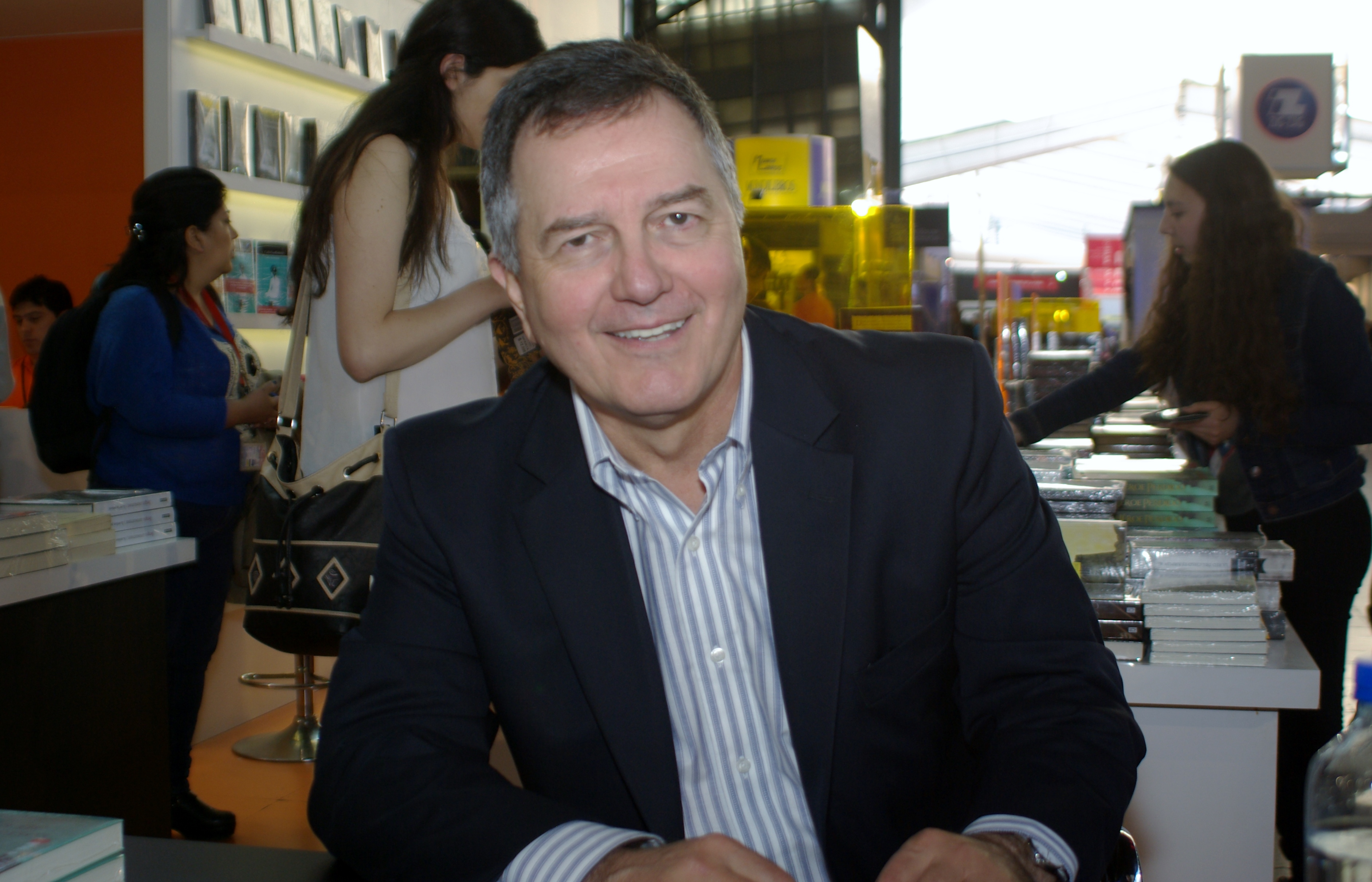 El escritor chileno Roberto Ampuero en la Feria Internacional del Libro de Santiago 2015